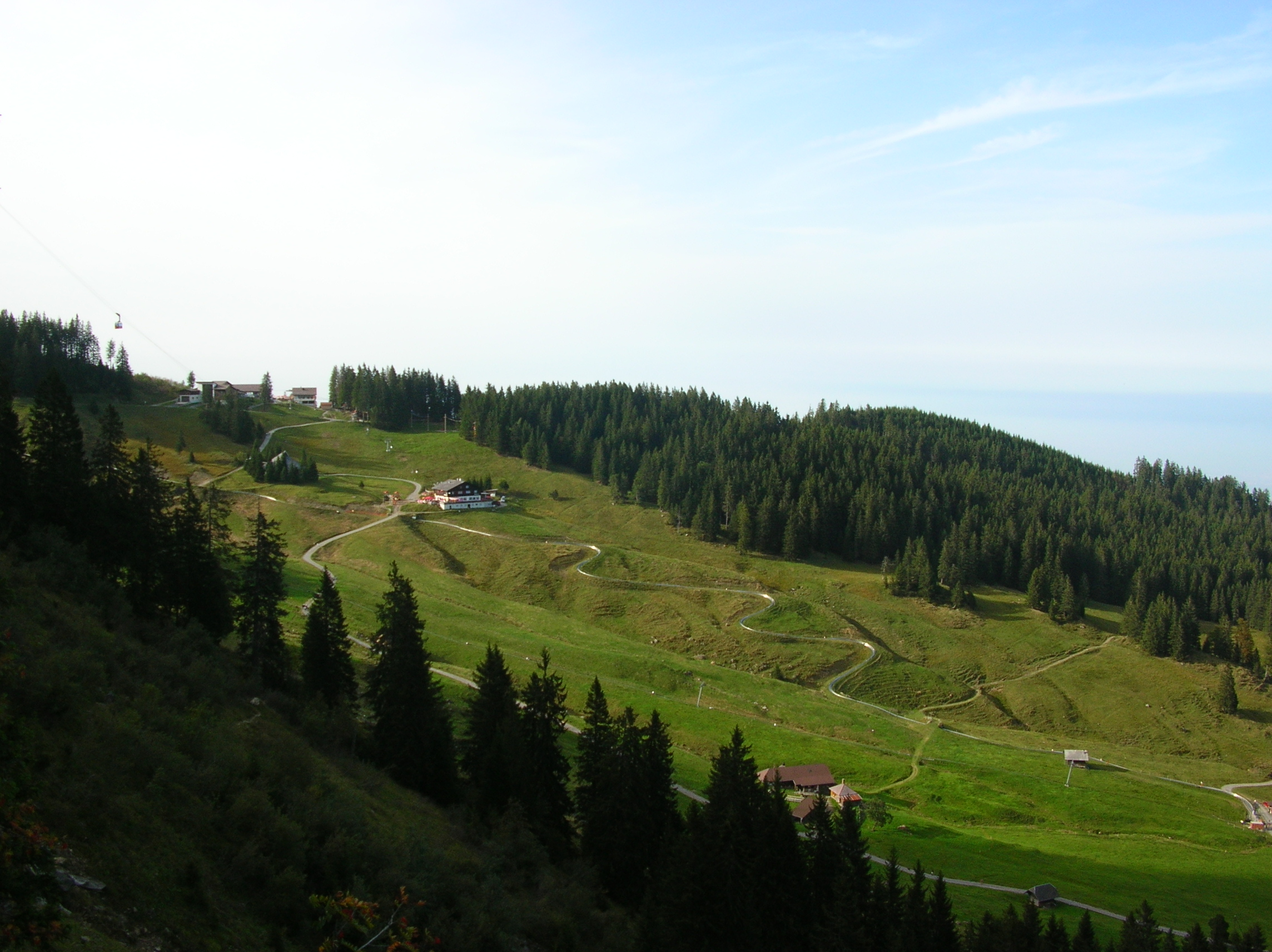 Fräkmüntegg